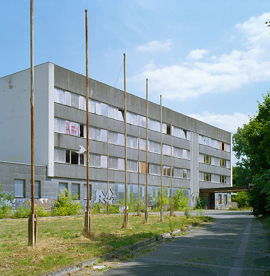 Berlin-Niederschönhausen, Tschaikowskistraße 1, Appartementhaus im Schlosspark Schönhausen. Ansicht gegen Süden.